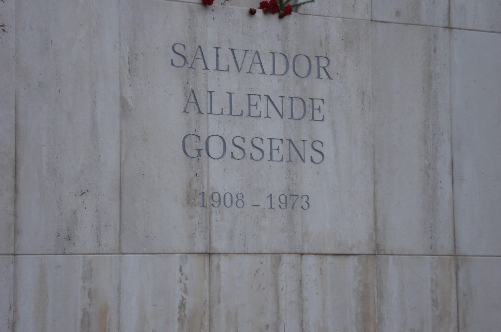 Tumba de Salvador Allende en el Cementerio General de Santiago de Chile.